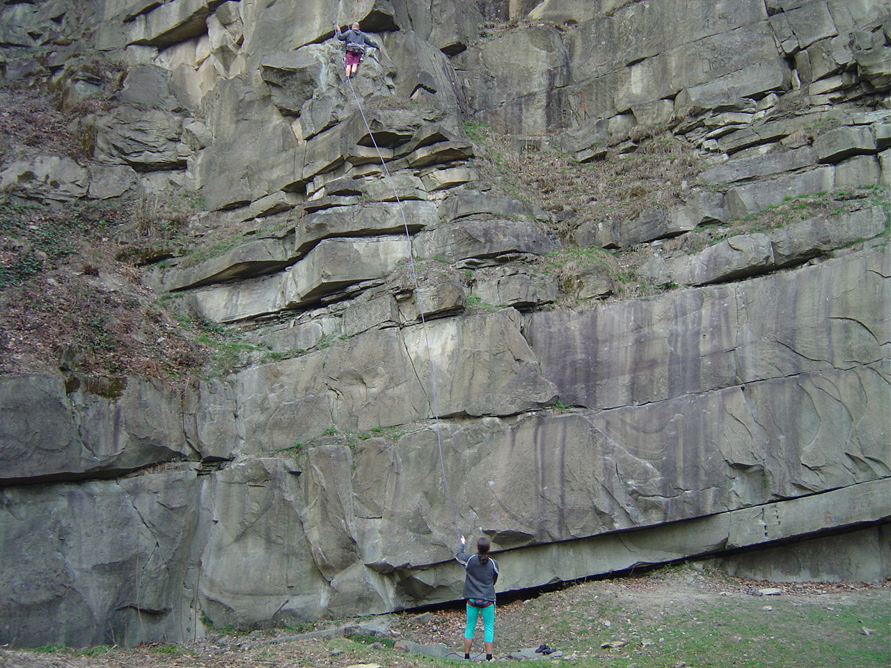 Godula (skála) 1